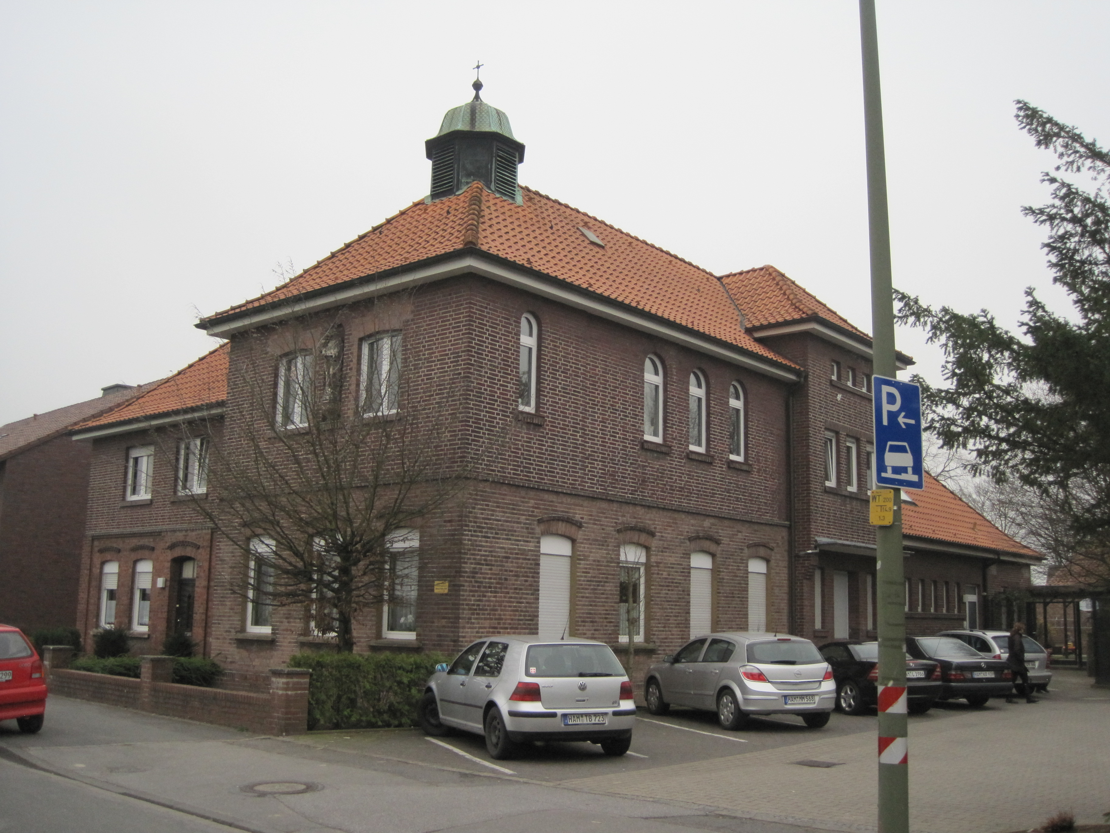 Das Foto zeigt den Marienstift in Hamm-Bockum-Hövel.